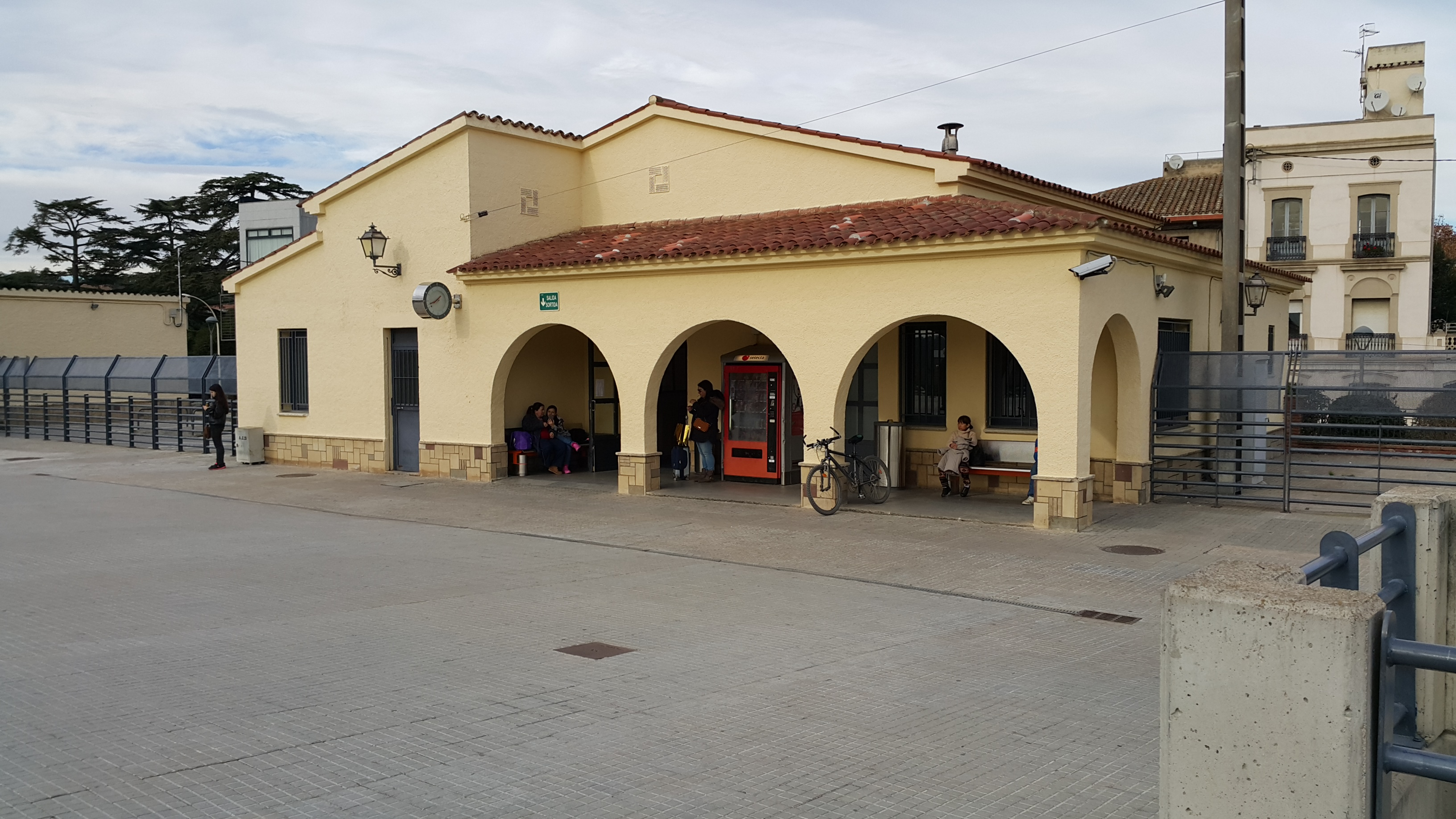 Vista de l'estació de Cardedeu al 2015 (Vallès Oriental). Situació: Avinguda del Rei Jaume I, 2.08440 Cardedeu.